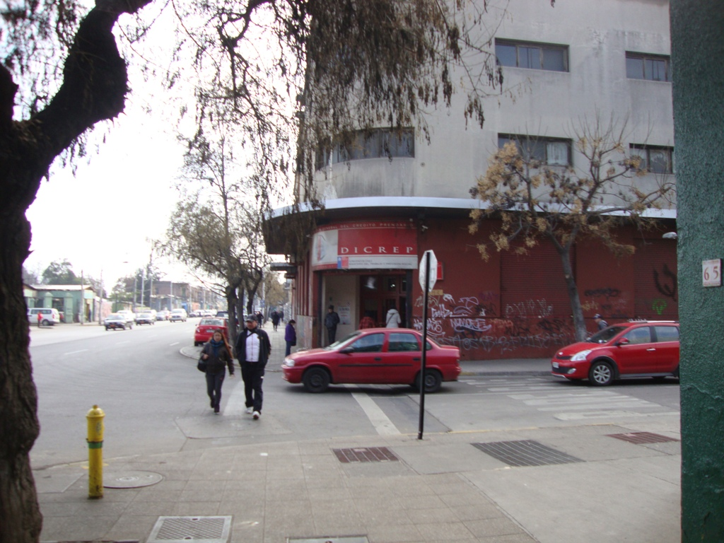 La "Tia Rica", casa de empeños de la DICREP, ubicada en Avenida Matucana, Estación Central